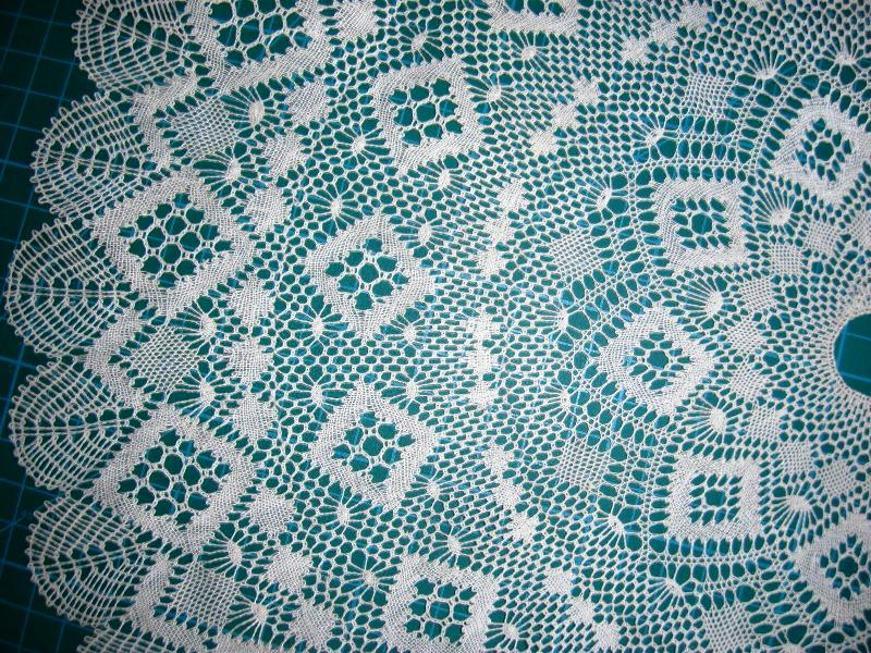 Dantel Örüsü ile yapılmış Masa Örtüsü Örneği